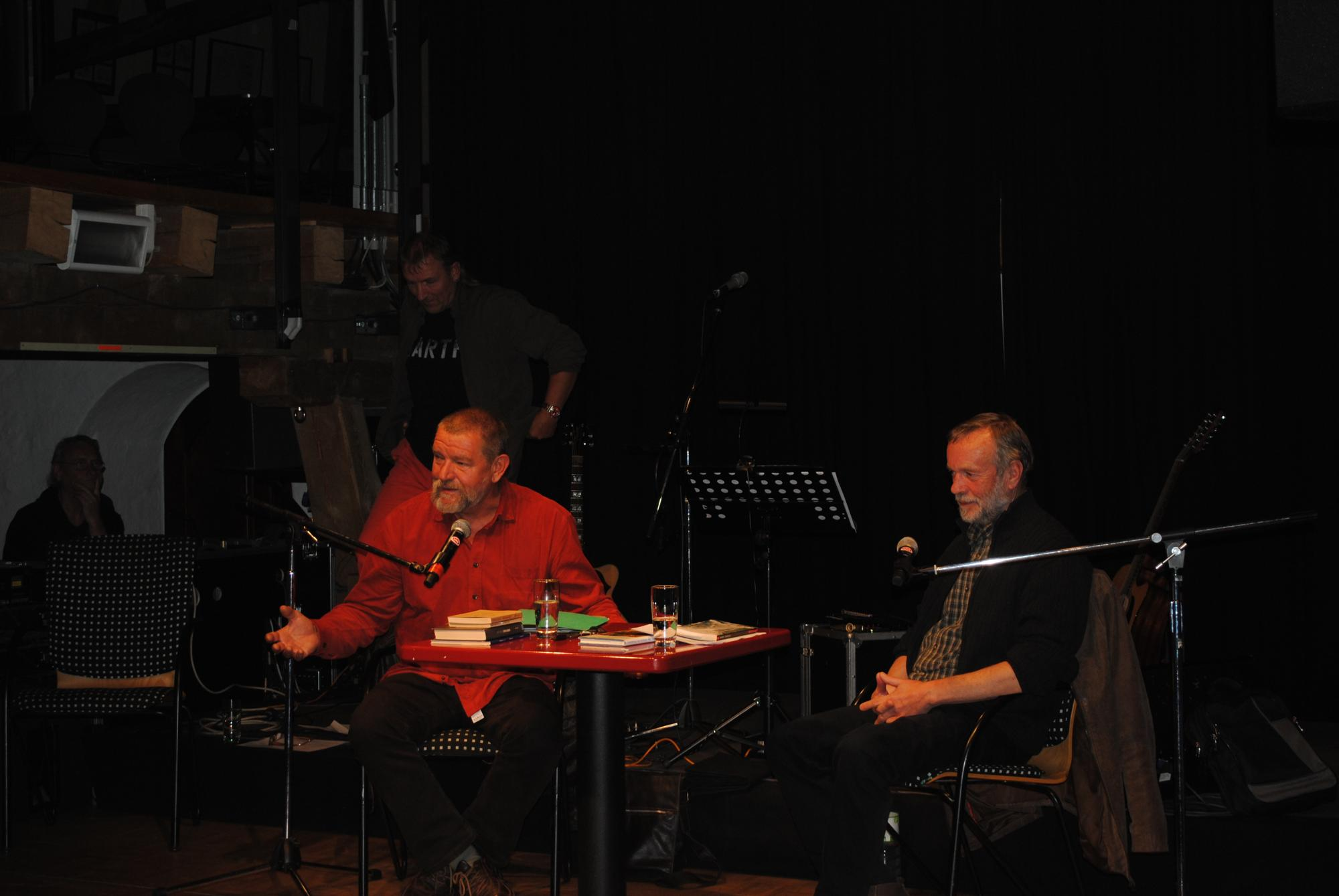 Lesung im Malzhaus in Plauen links Andreas Schirneck, mitte Udo Scherr, rechts Utz Rachowski